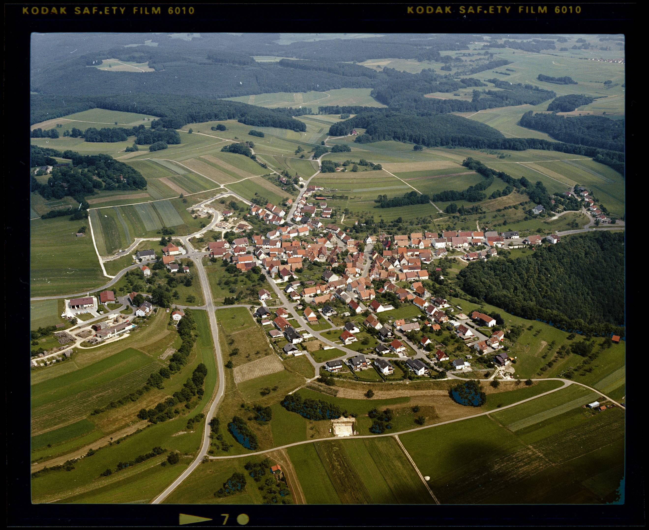 Luftbild von Schopfloch - Staatsarchiv Sigmaringen - Archivalieneinheit N 1/96 T 1 Nr. 480